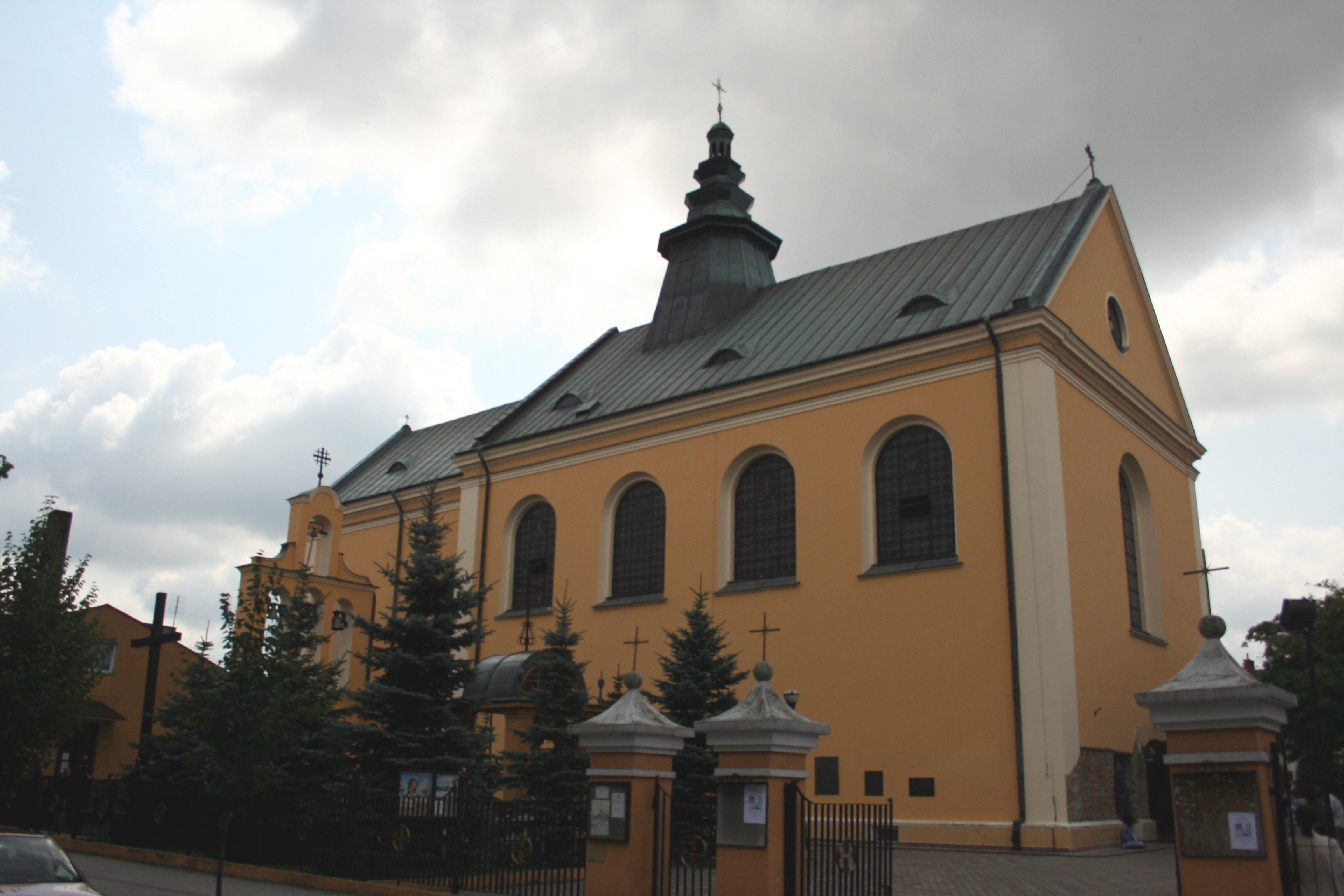 Kościół garnizonowy pw. MB Królowej Polski